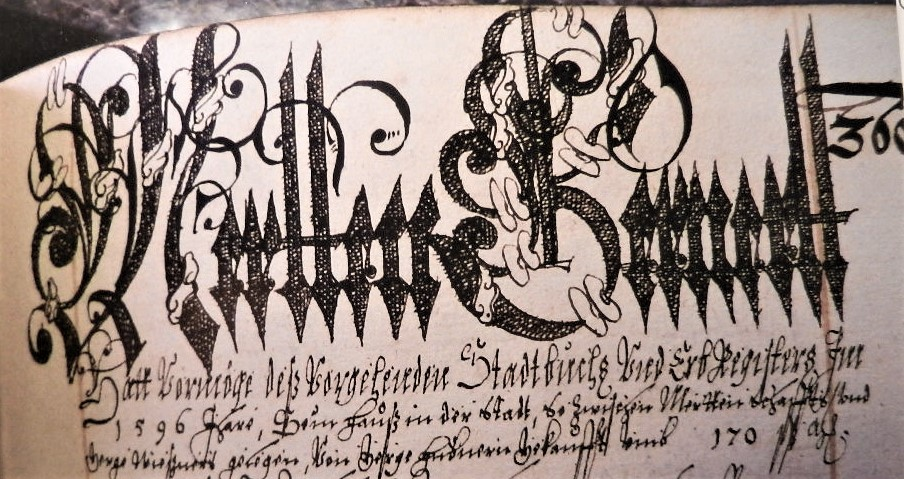 Initiale M und G Perlen eingeschnürte Schrift, Ratvorsitzender gleiche Schriftform wie der Adel von Wallenstein als Zeichen der Würdigung des Bürgertums